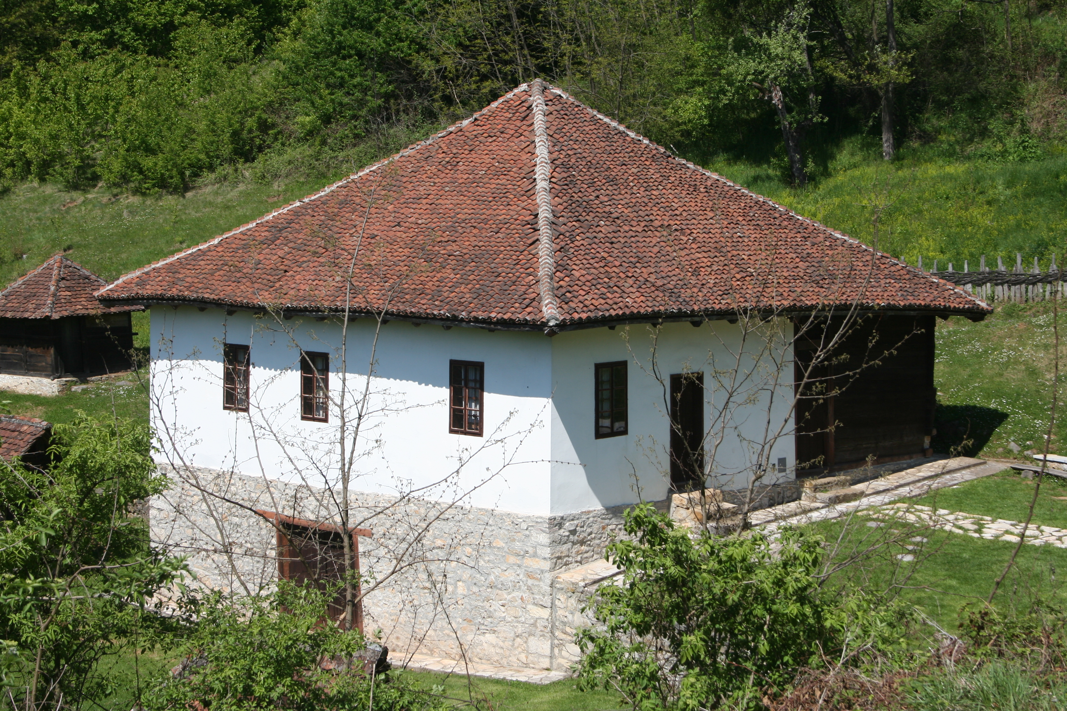 Rodna kuća vojvode Živojna Mišića u Struganiku